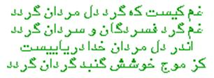 „Mi ez a szomorúság, amely / Keserű szívekre telepedett? / A szív, amelyben ott van Isten, óceán / Boldog hullámai fordítják a Földet.” (Részlet Dzsalál ad-Dín Rúmí egyik verséből)